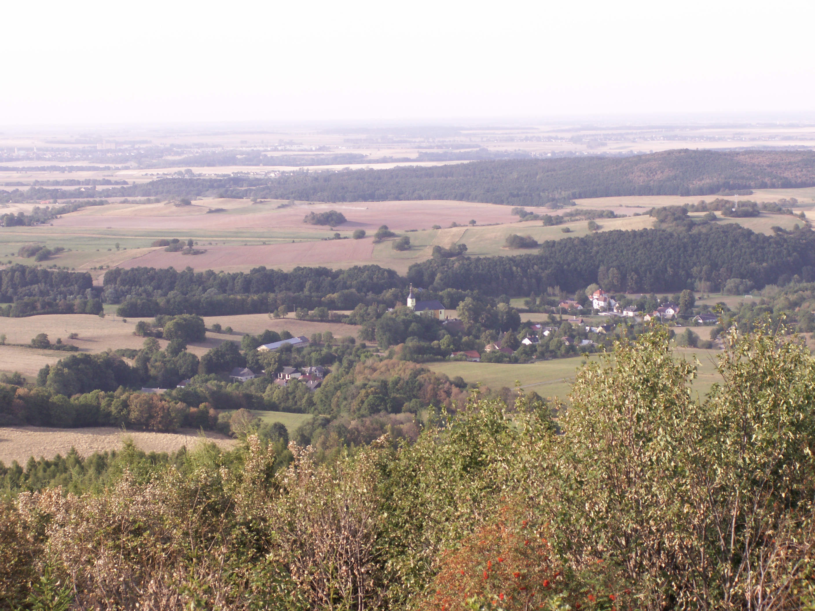 Pitárné, část obce Vysoká, okres Bruntál, kraj Moravskoslezský, pohled na obec z rozhledny Strážnice